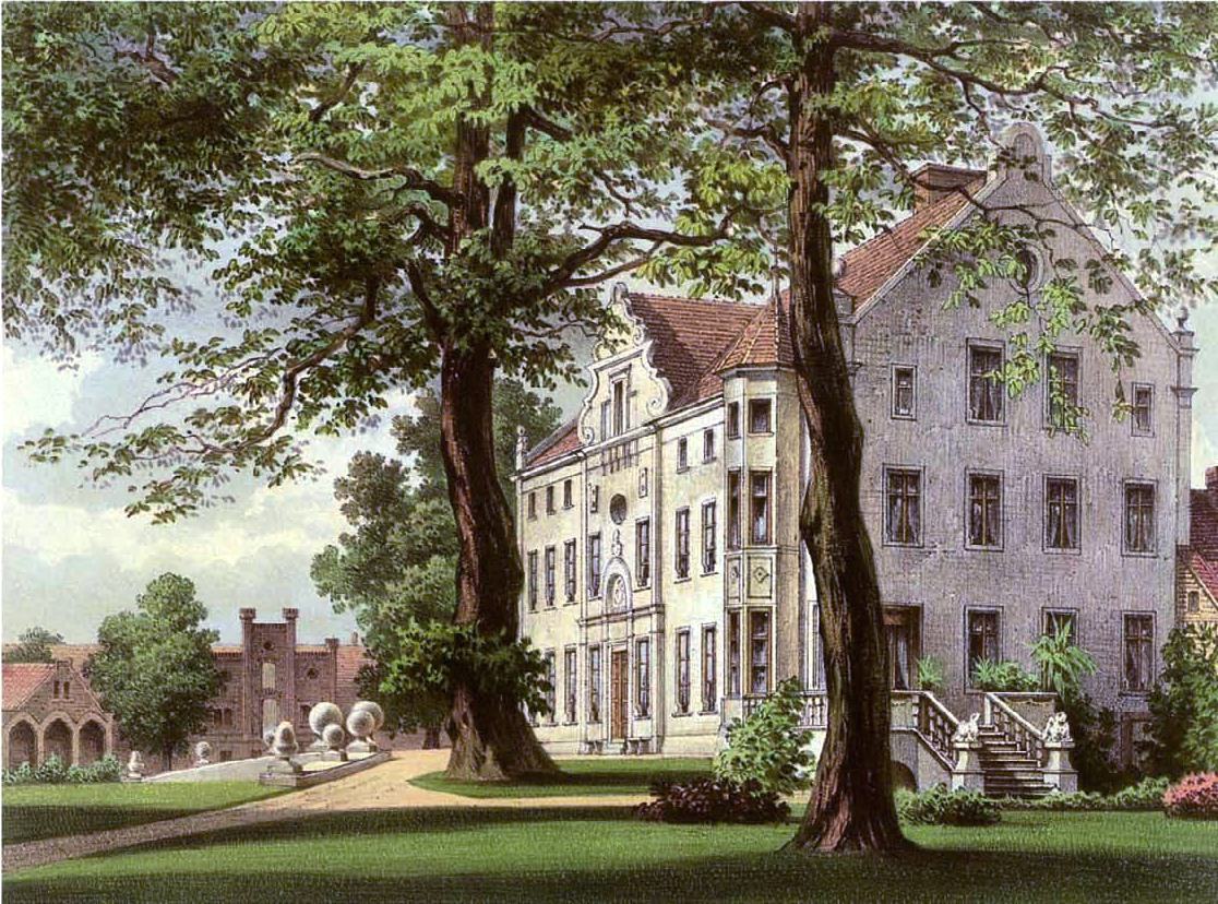 Schloss Groß Schwansfeld, Kreis Friedland